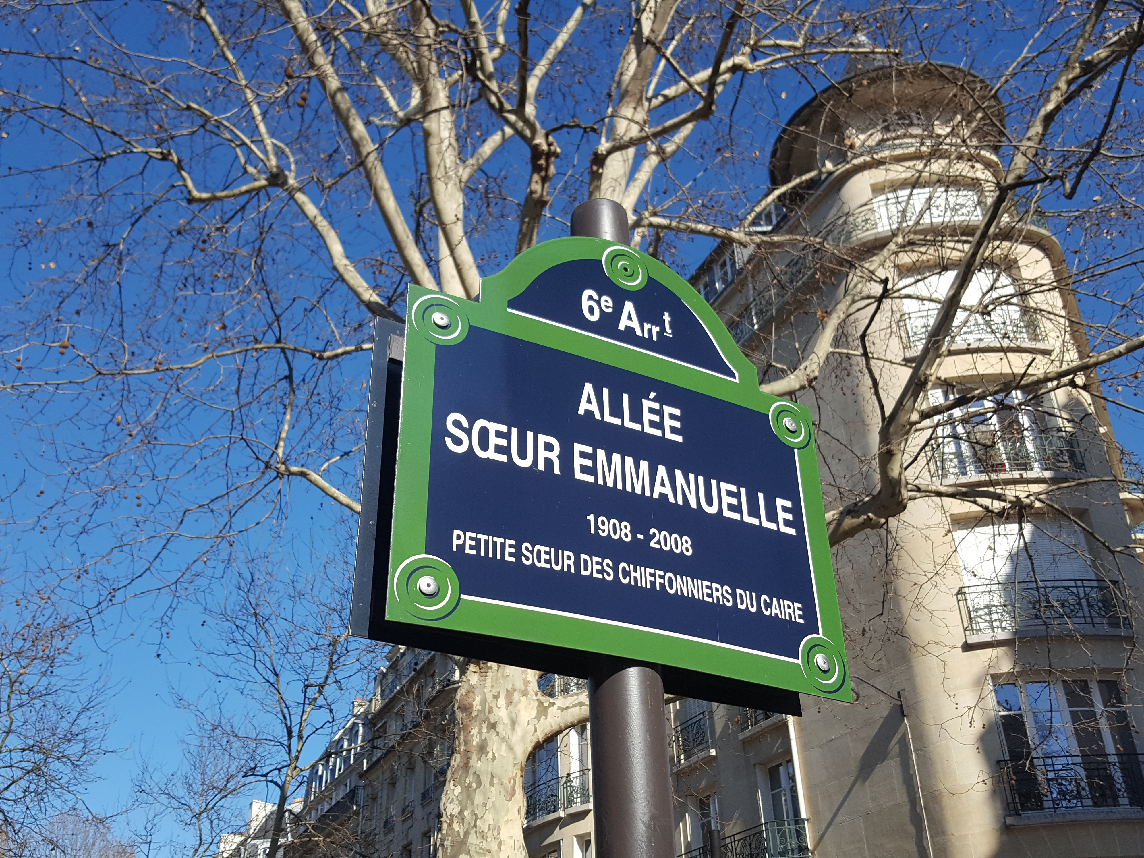 Plaque de rue de l'allée Soeur Emmanuelle dans le 6e arrondissement de Paris